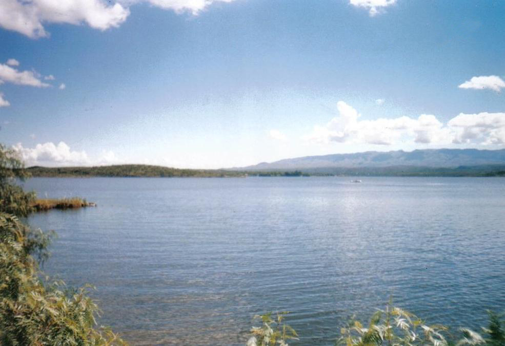 Foto del Dique La Florida, San Luis, Argentina.